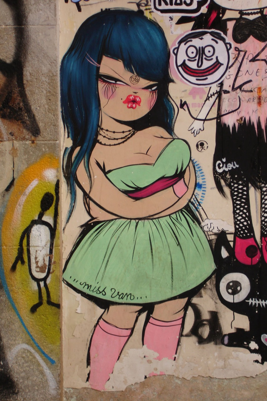 Graffiti by Miss Van, Plaça de Sant Josep/Mercat de la Boqueria, Ciutat Vella (Barcelona)Miss Van